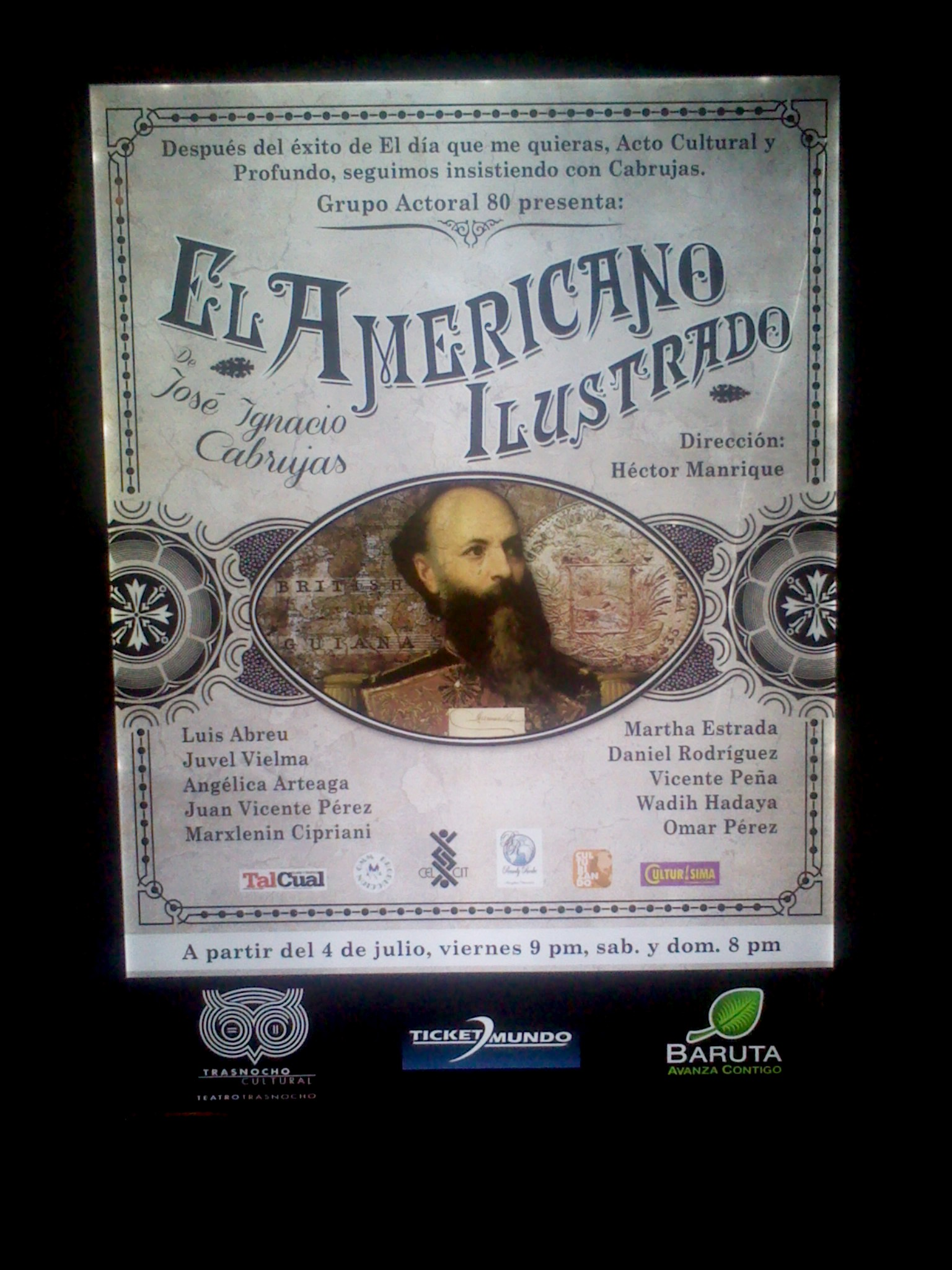 Afiche promocional de la obra El Americano Ilustrado, del dramaturgo venezolano José Ignacio Cabrujas. Teatro Trasnocho, Caracas, 2014.